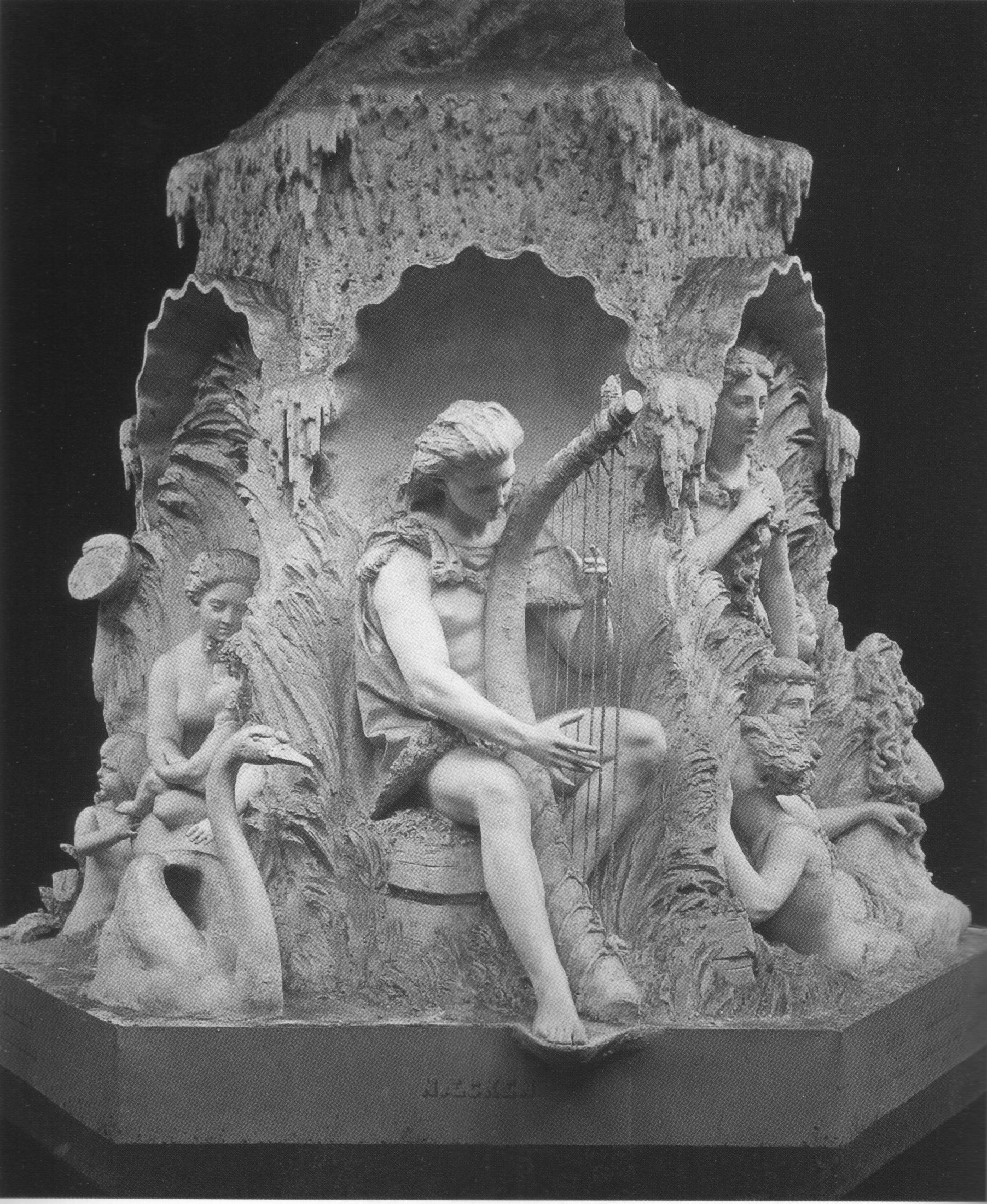 Molins fontän, skapad av bildhuggaren Johan Peter Molin (1814-1873)